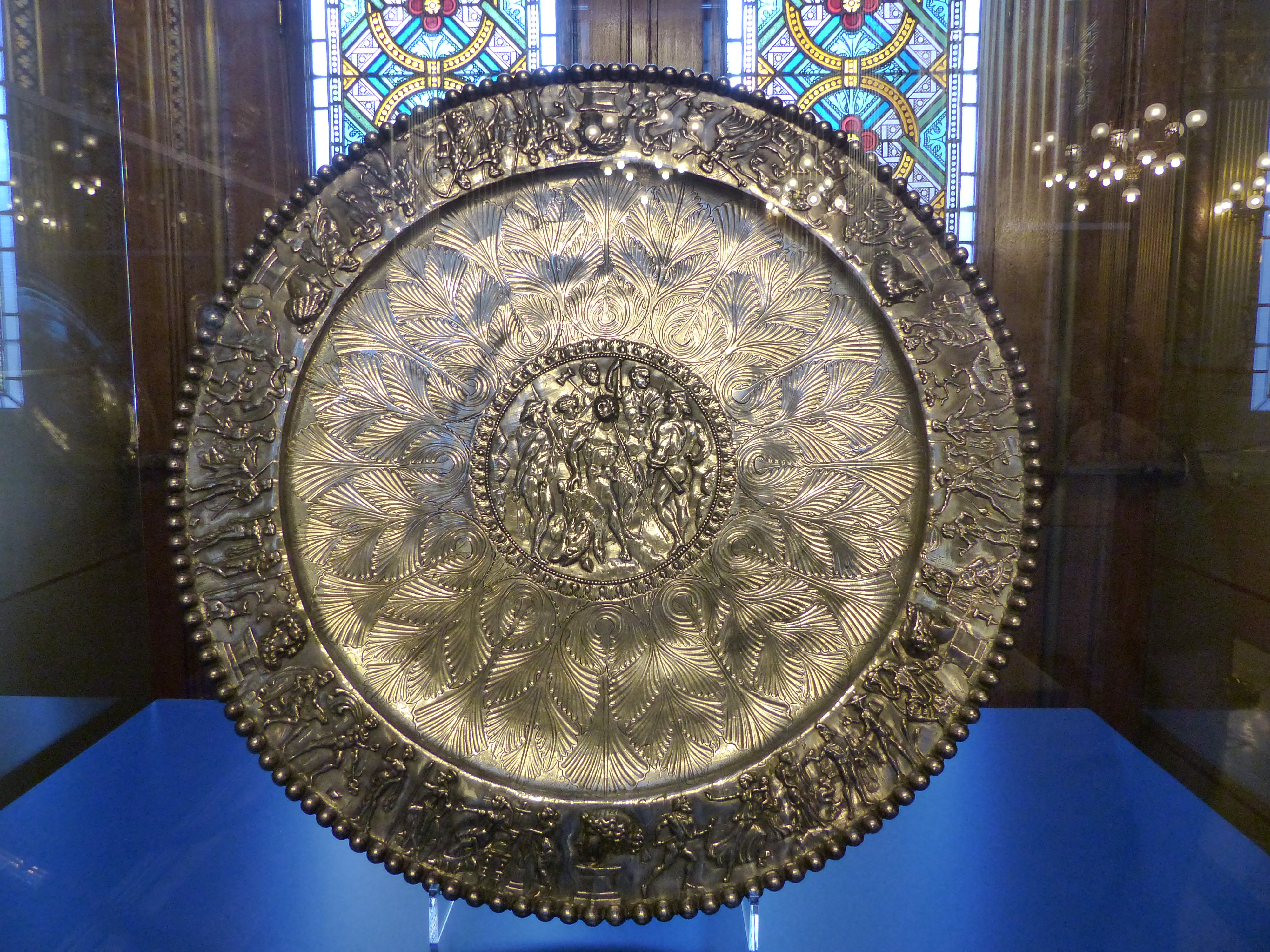 Meleagrosz-tál. Seuso kincslelet. Átmérője 69,4 cm, tömege 8,6 kg. Központi medalionjában ókori görög vadásztörténet, a kalydoni vadkanvadászat dömborműves ábrázolása látható. A tál peremén görög mitológiai történetek láthatóak. A felvétel 2017. július 17-én, hétfőn készült az Országházban, Budapesten.